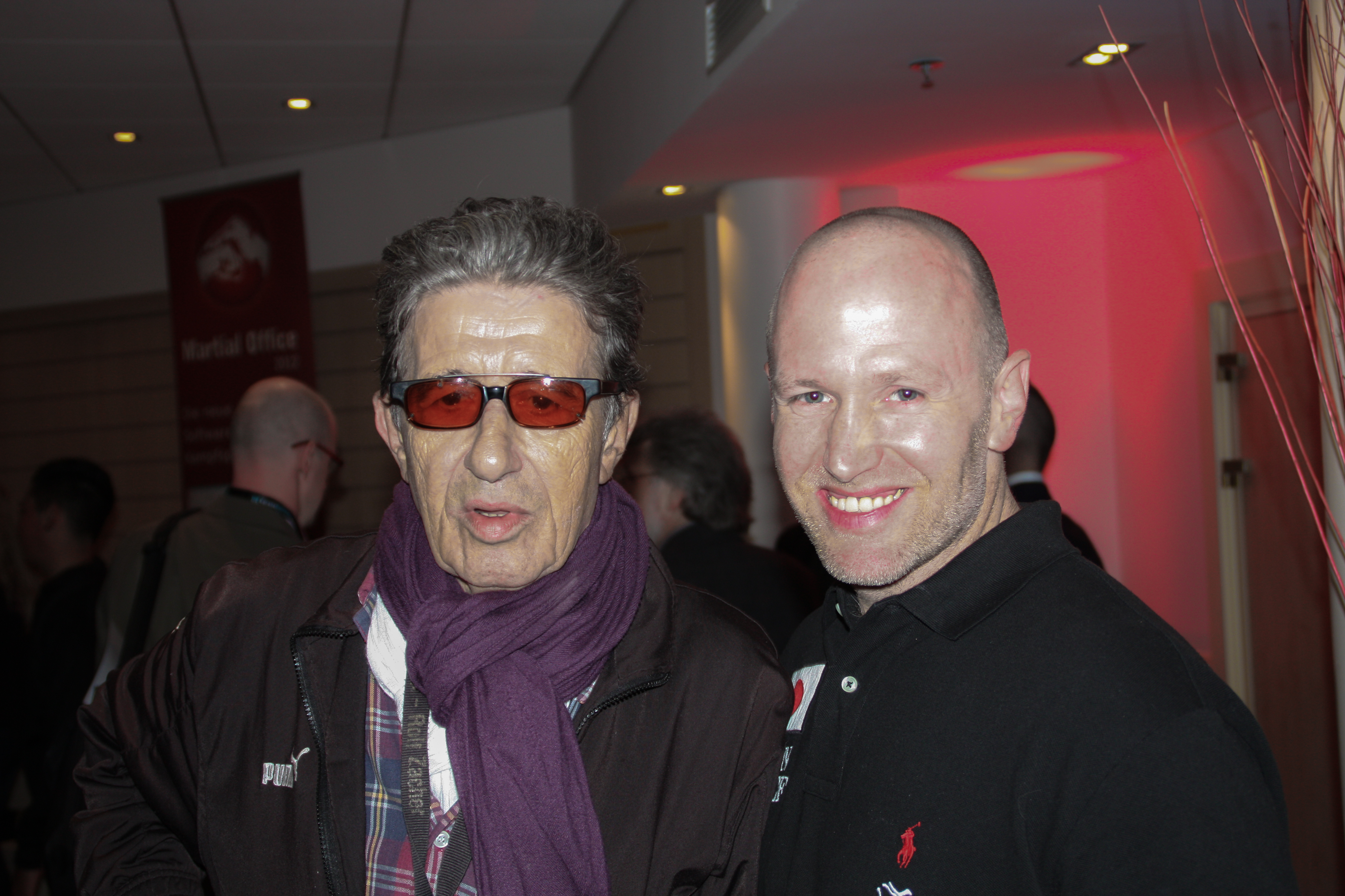 Andrè Mewis & Rolf Zacher